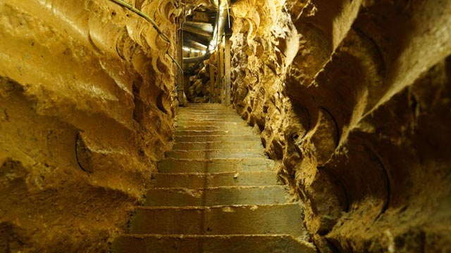 סיור במנהרת הדגל של חיזבאללה. נטרולה של מנהרת הדגל "רמיה", השישית והאחרונה. המנהרה שמגיעה לעומק 80 מטרים, שזהה לכ-22 קומות, ופתחה נמצא כ-77 מטרים לתוך גבול ישראל. בפתח המנהרה.